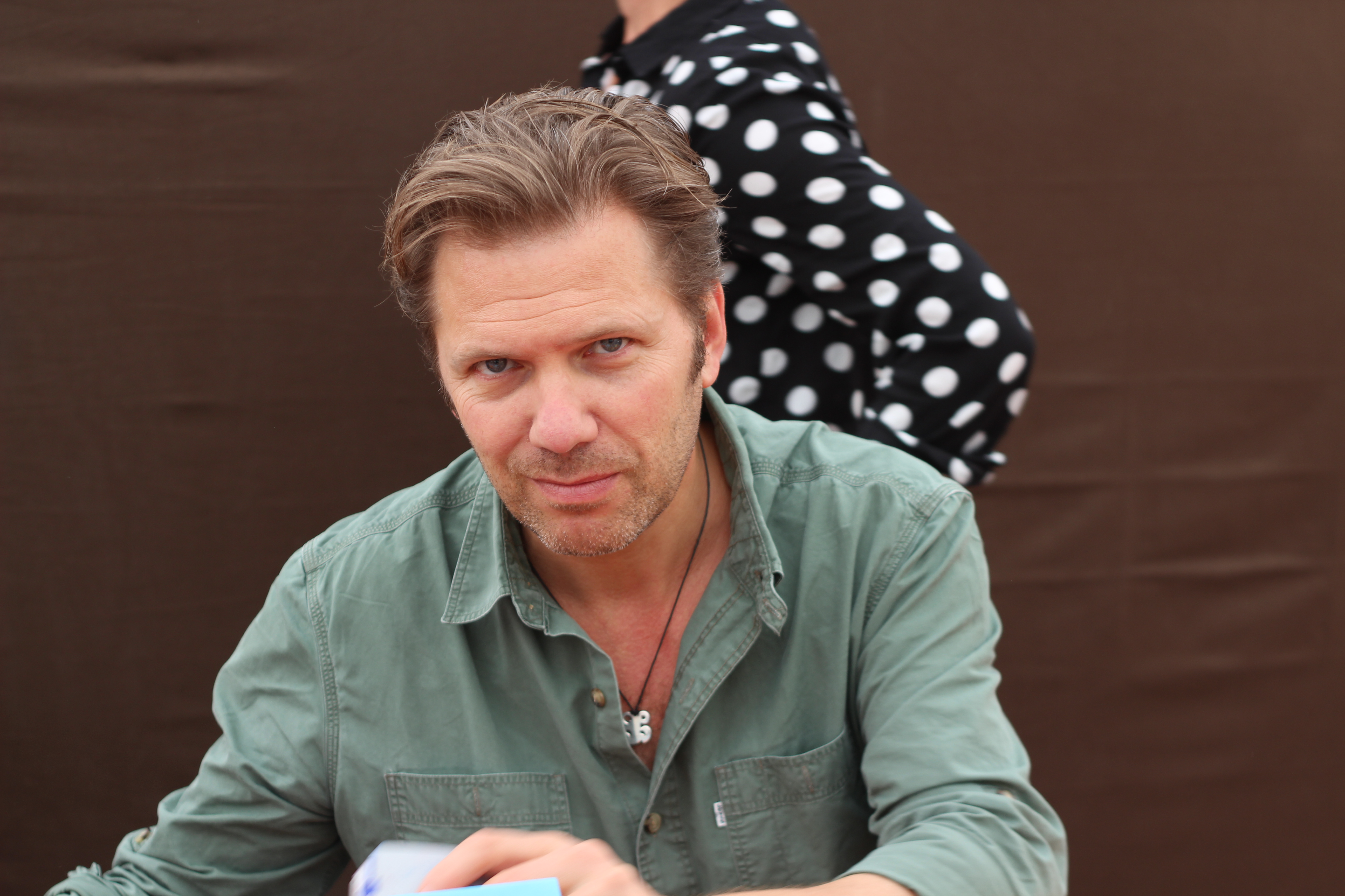 Olivier Truc au Livre sur la Place 2014